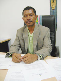 Vize-Sozialminister Jacinto Rigoberto